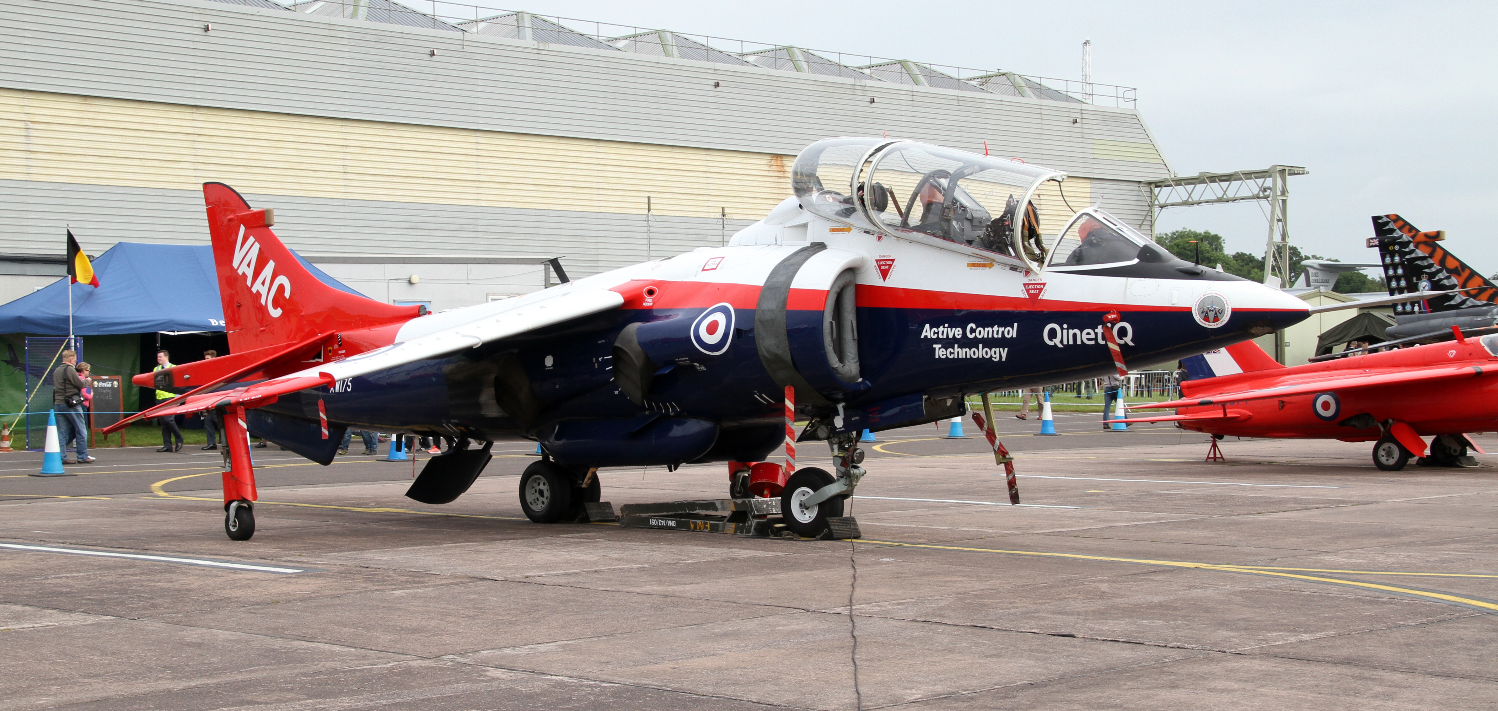 VAAC Harrier